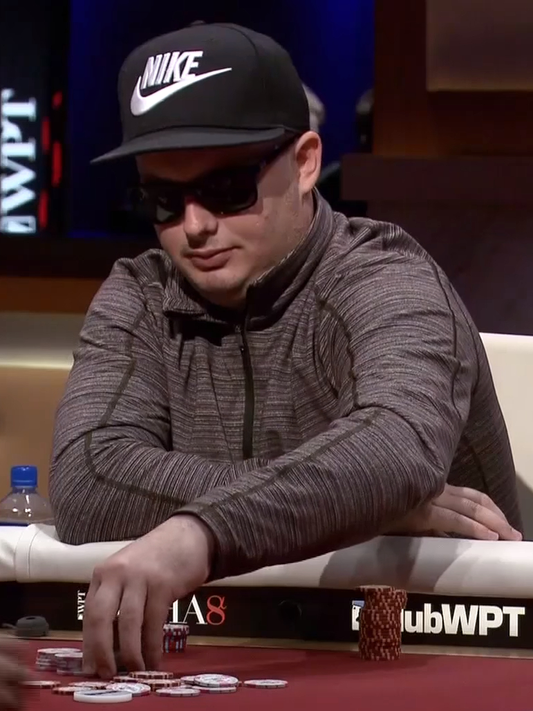 Paul Volpe beim WPT Alpha8 in Las Vegas